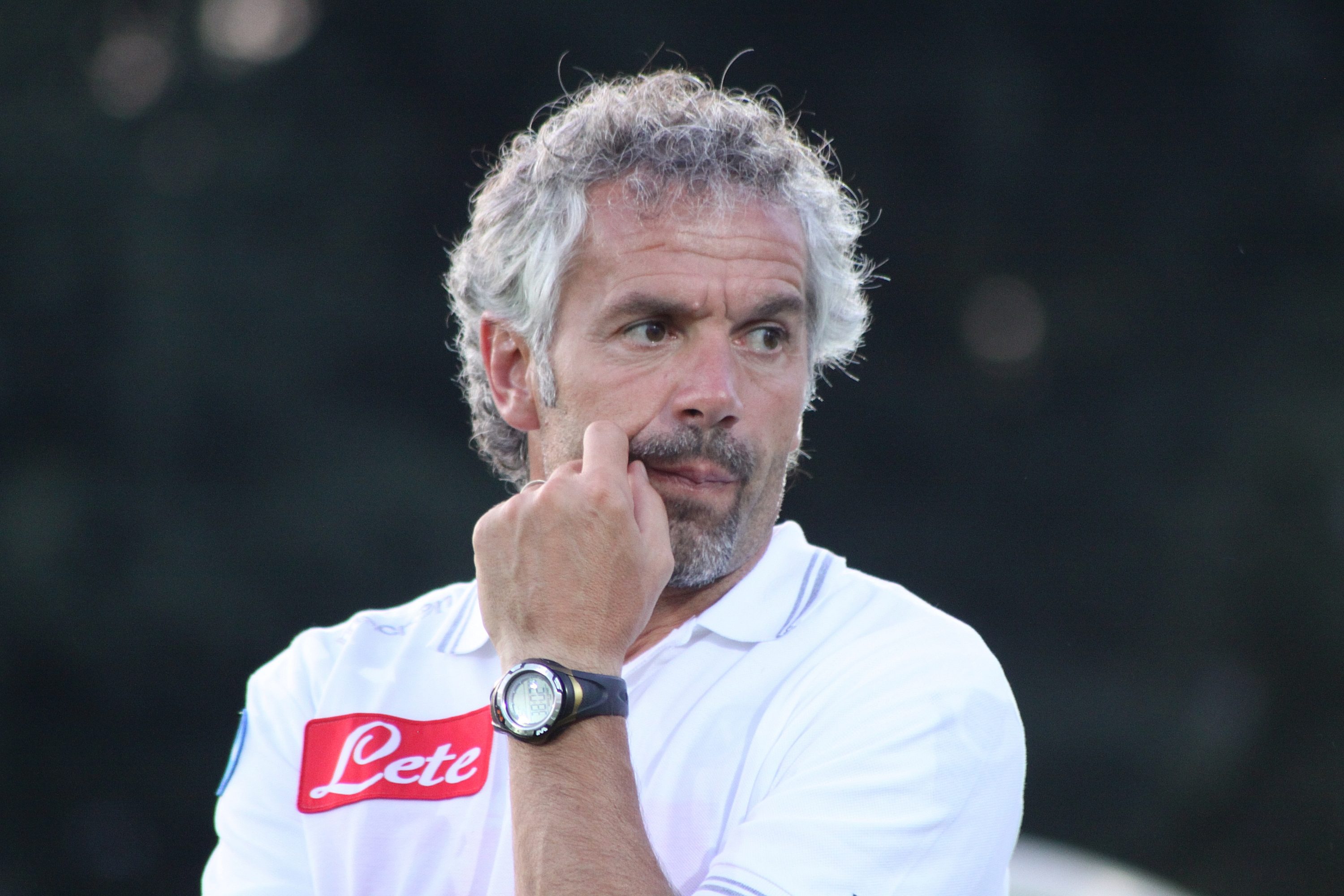 Trainer Roberto Donadoni - SSC Neapel (2) Allentatore Roberto Donadoni - Società Sportiva Calcio Napoli